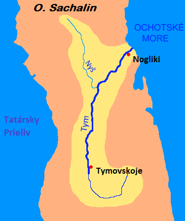 Popis rieky Tym po slovensky